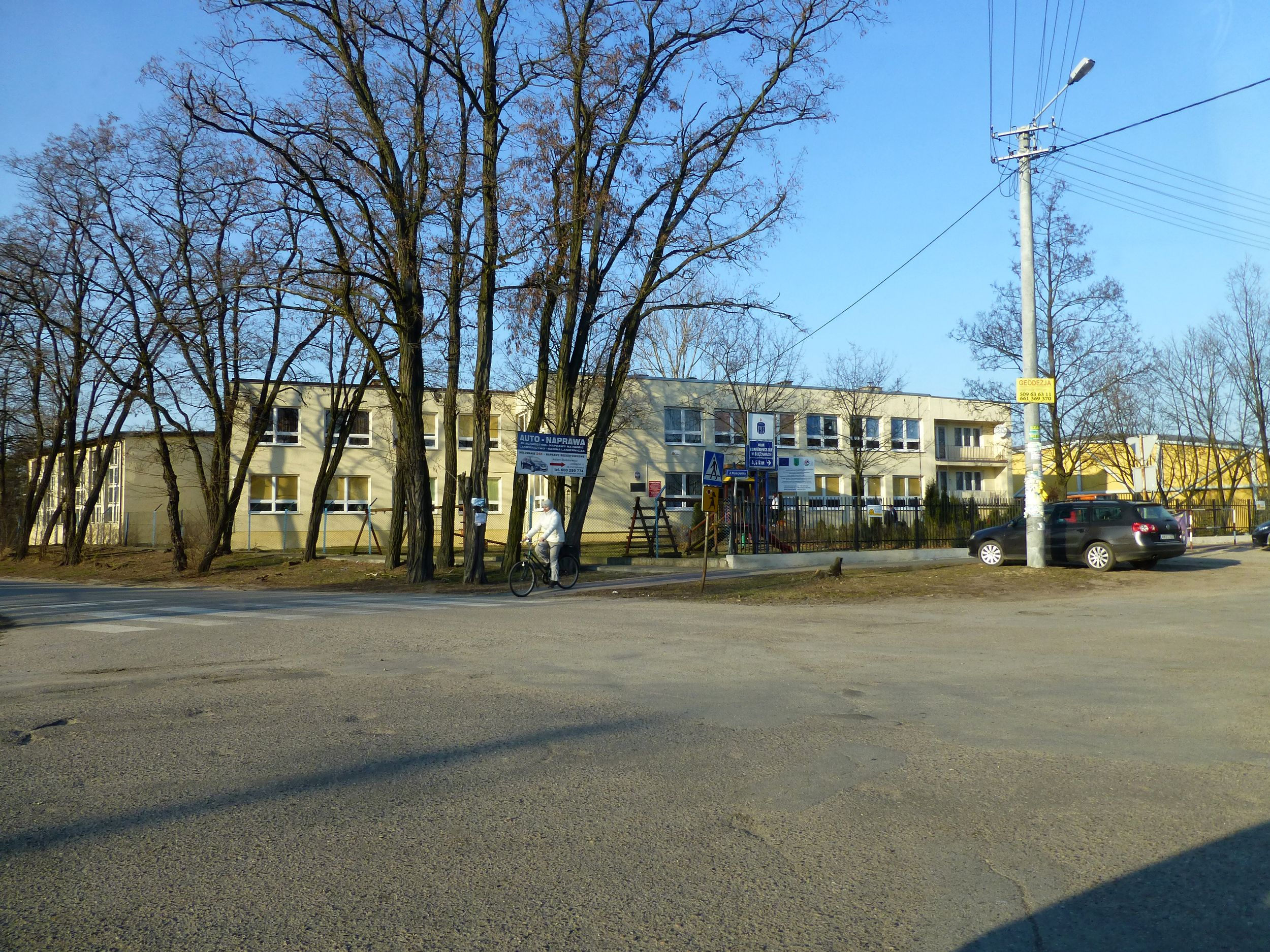 Józefów, gm Dąbrówka, szkoła podstawowa